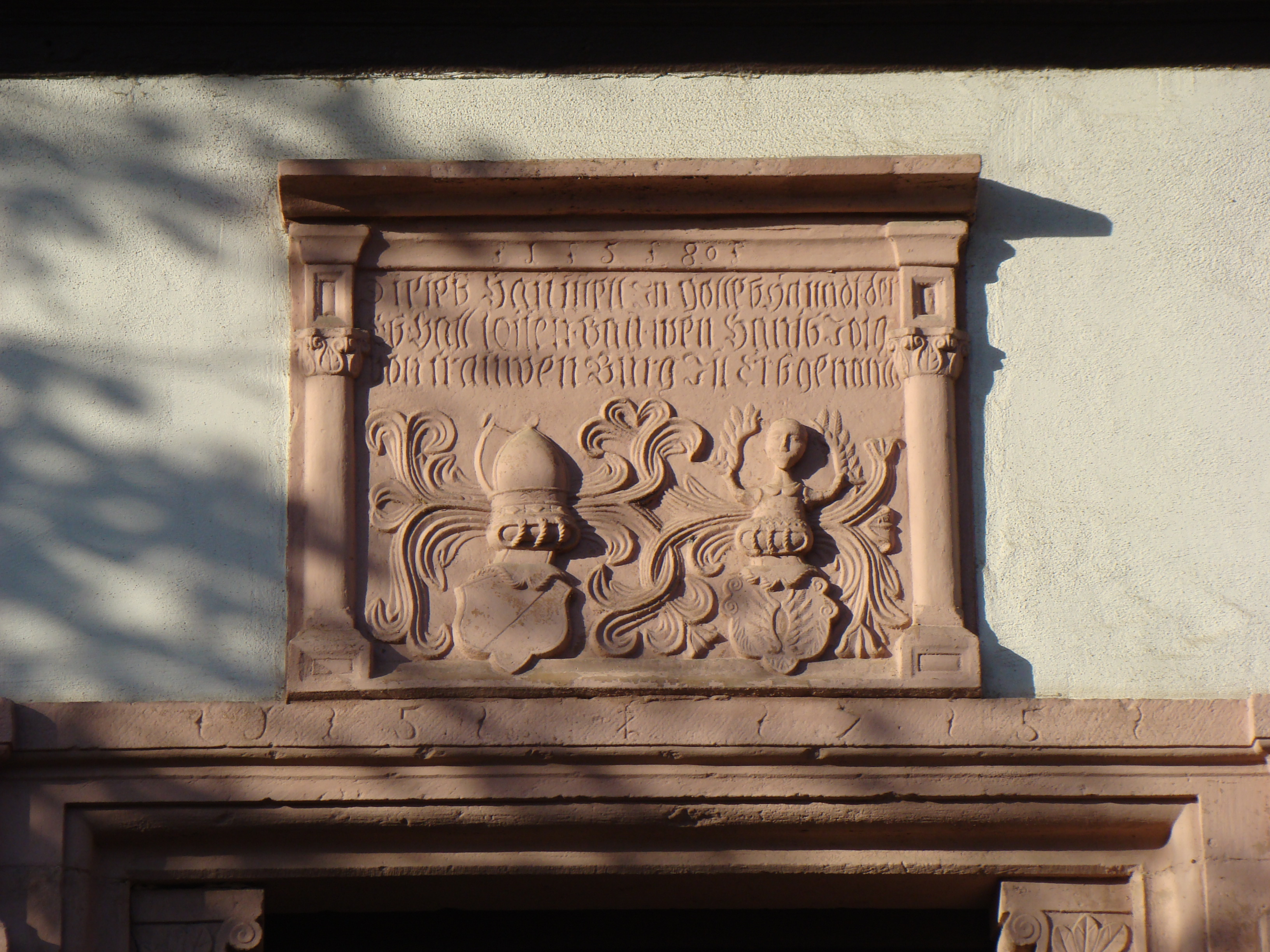 Altwiesloch, Bürgerhaus, Wappenstein mit Datierung über dem ebenfalls datierten Portal